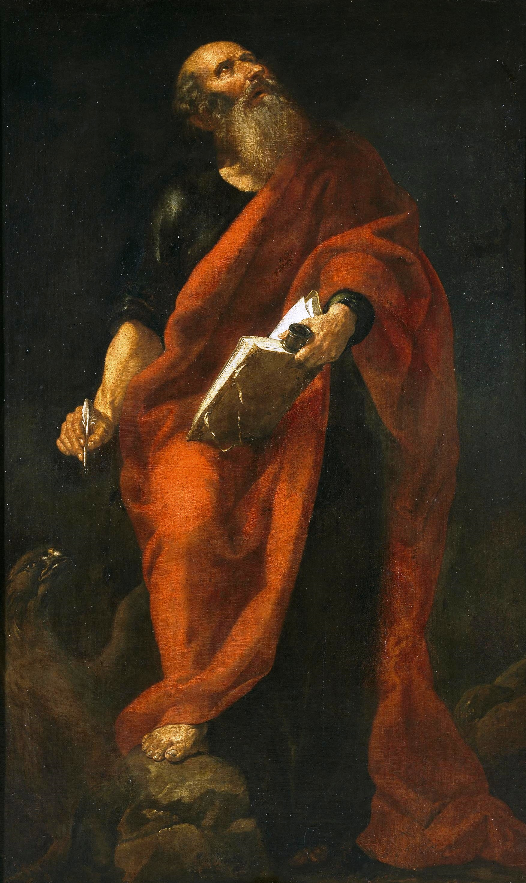 La obra representa a San Juan Evangelista.